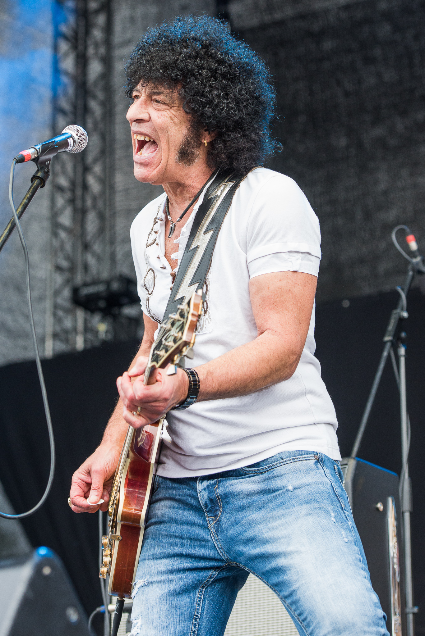 Brombachsee,Concertbüro Franken,Festival,Konzert,Lieder am See,Livekonzert,Livemusik,Mungo Jerry,Musik,Ray Dorset